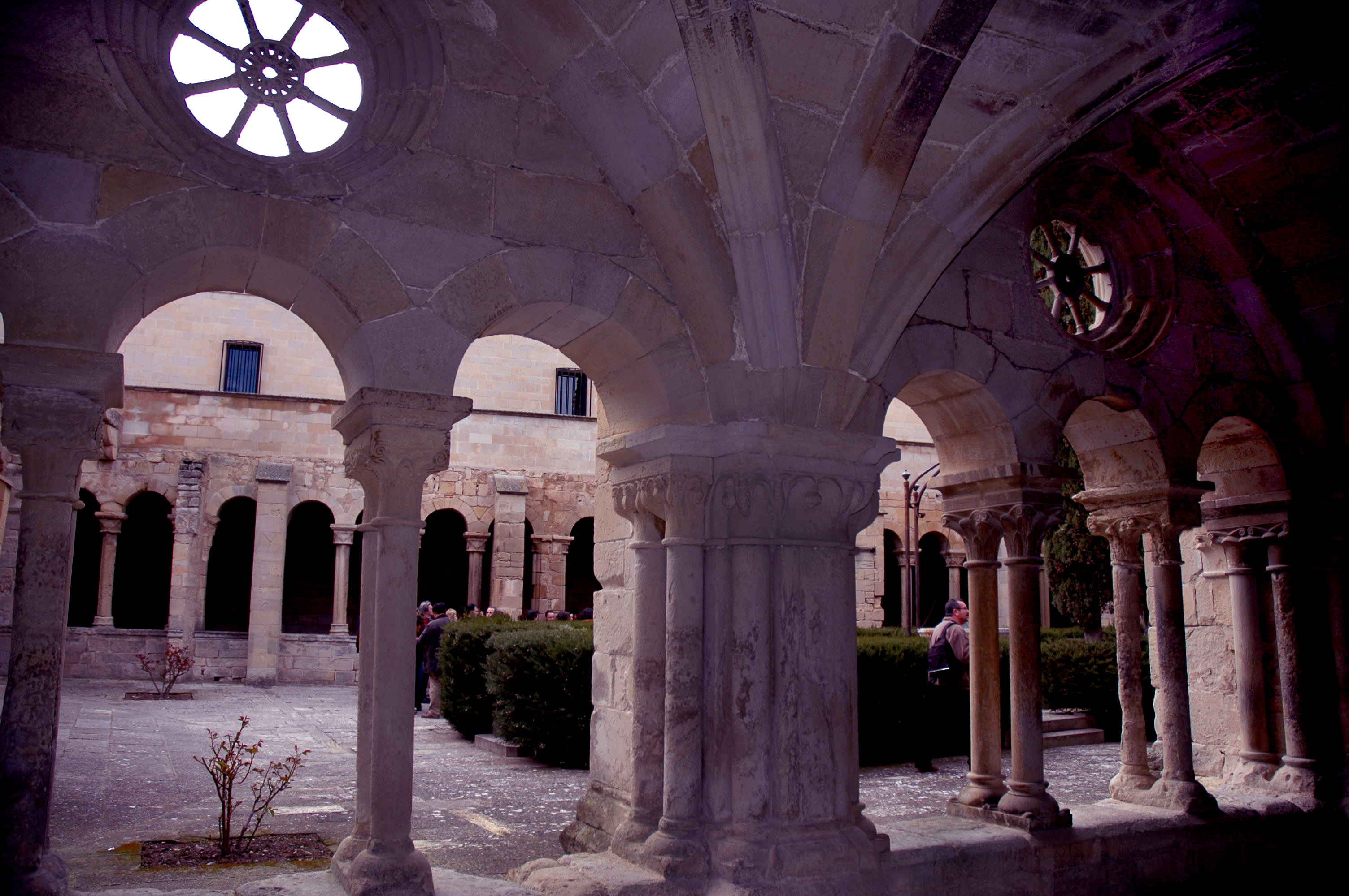 Vallbona de les Monges, ala est del claustre on s'aprecien els "ulls de bou" en forma de rodes. (Fot. JFS, 1998).